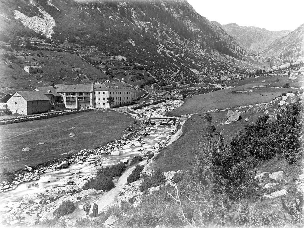 Imatge